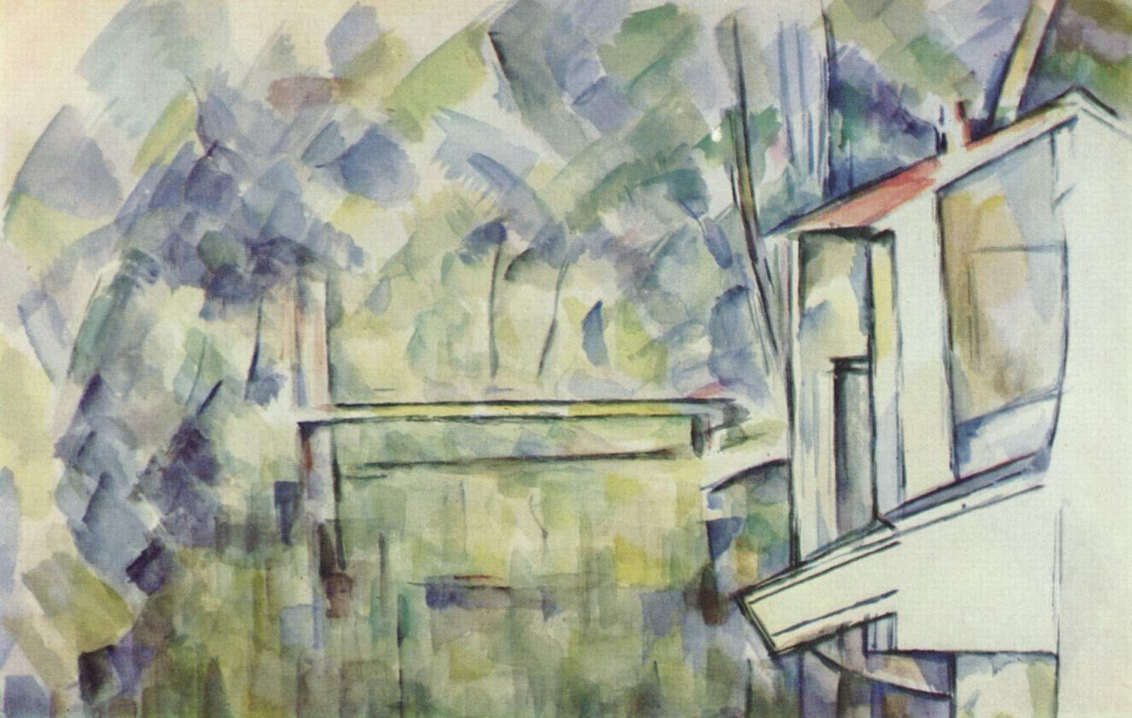 Mühle am Fluß